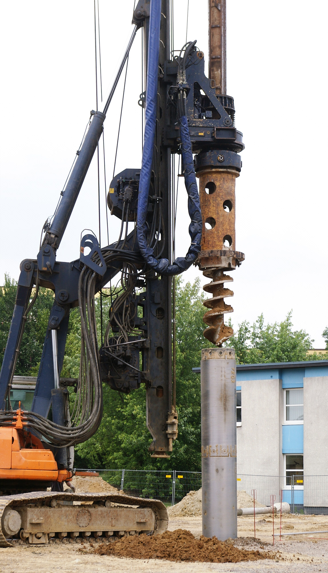 Bohrgerät für Pfahlgründungen